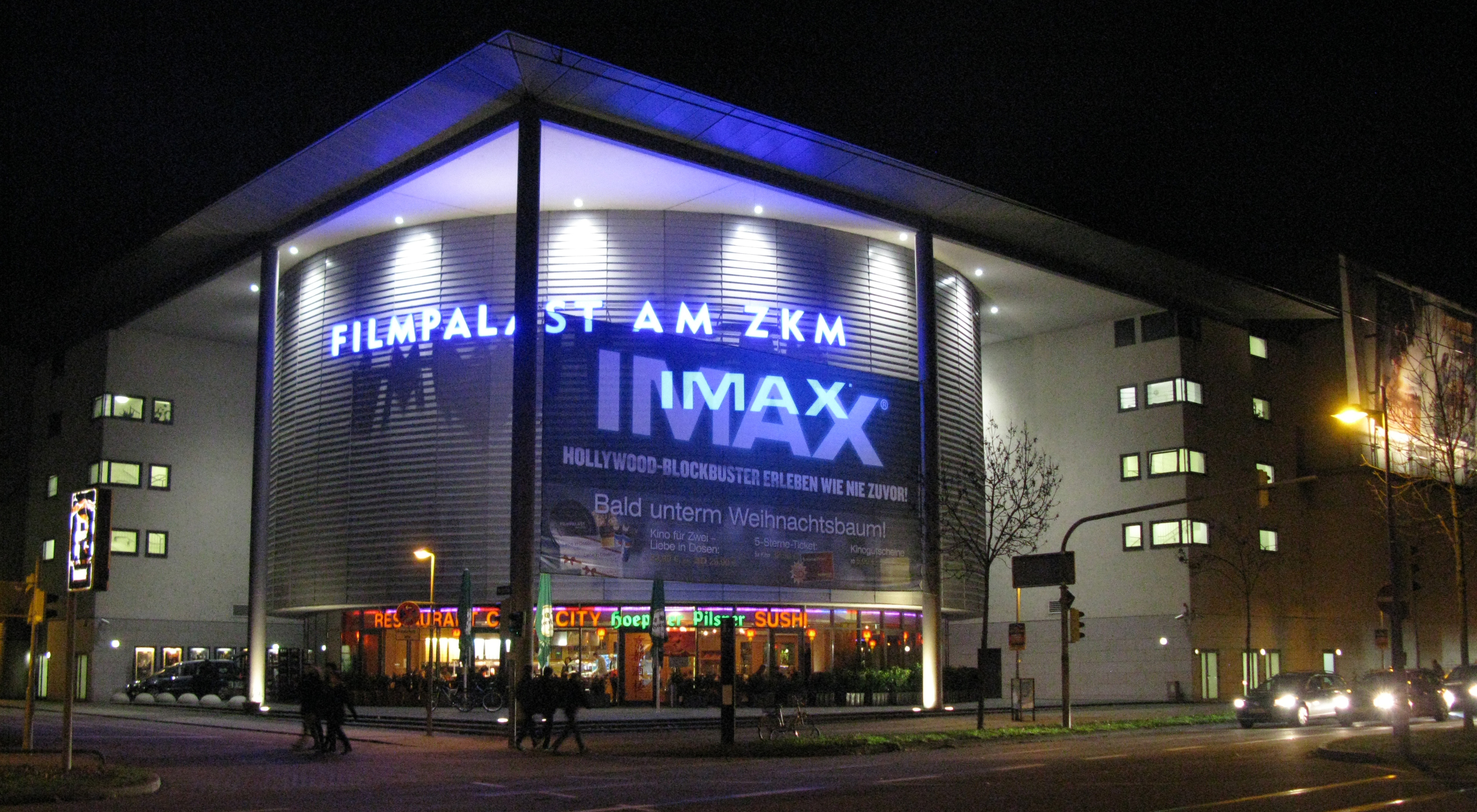 Filmpalast am ZKM in Karlsruhe